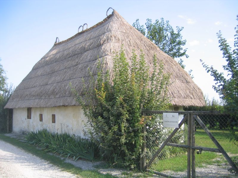 Il "casòn", abitazione contadina settecentesca a Piavon di Oderzo, Treviso, Veneto, Italia.